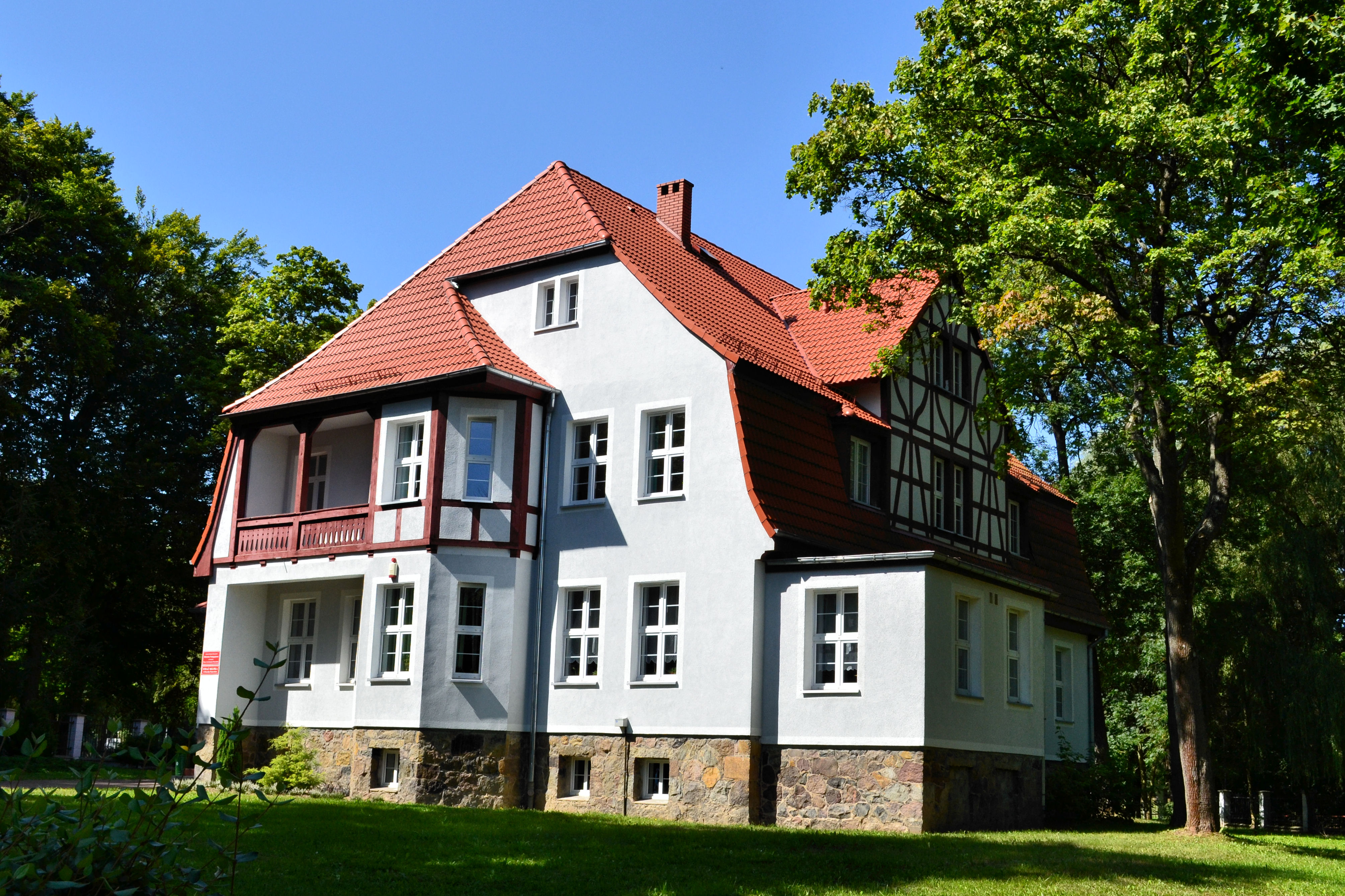 Willa przy ul. Obrońców Westerplatte 9b w Drawsku Pomorskim zaprojektowana przez Waltera Gropiusa